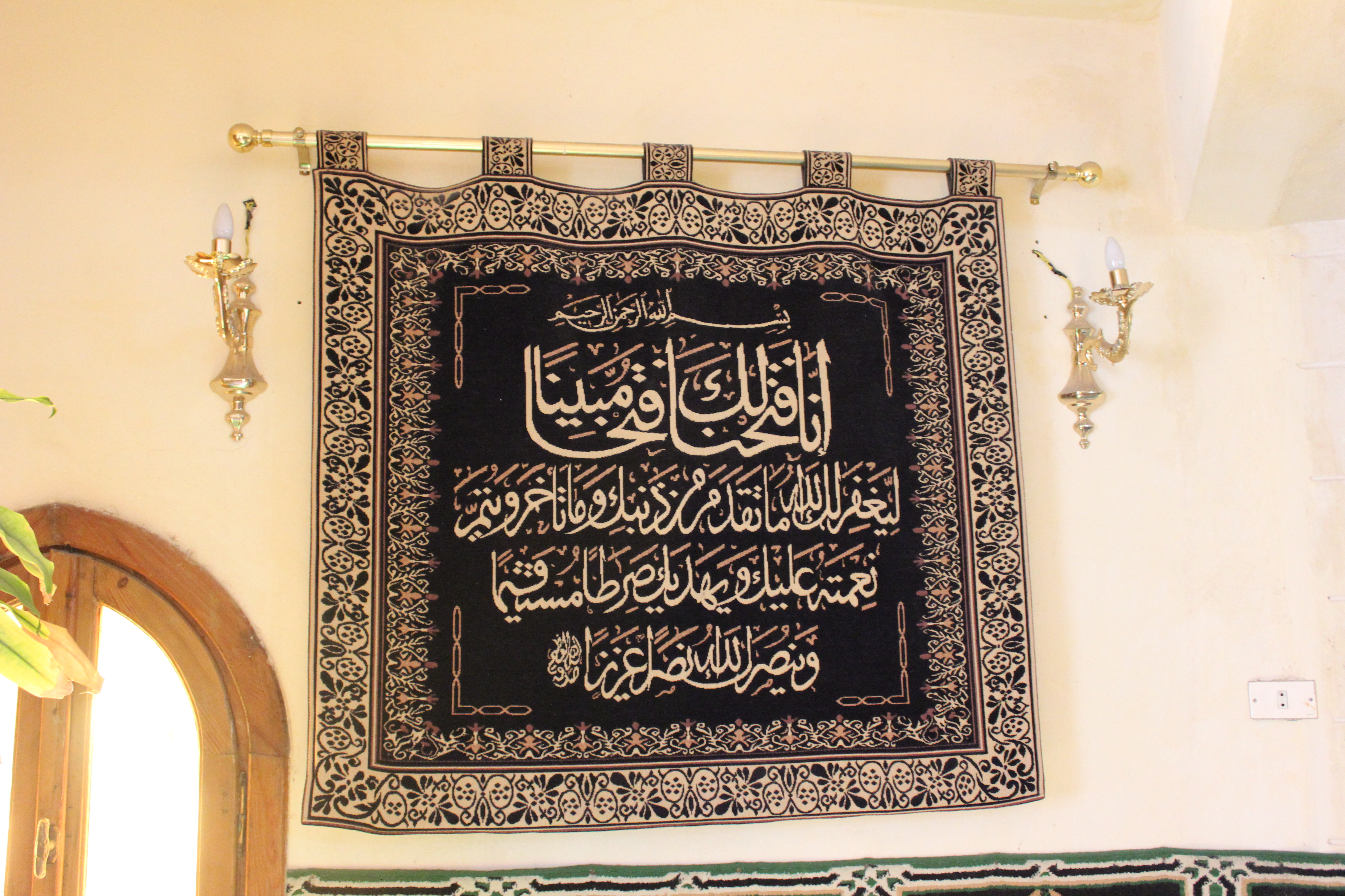 مسجد شيواه ناز بحدائق المنتزه بالإسكندرية.